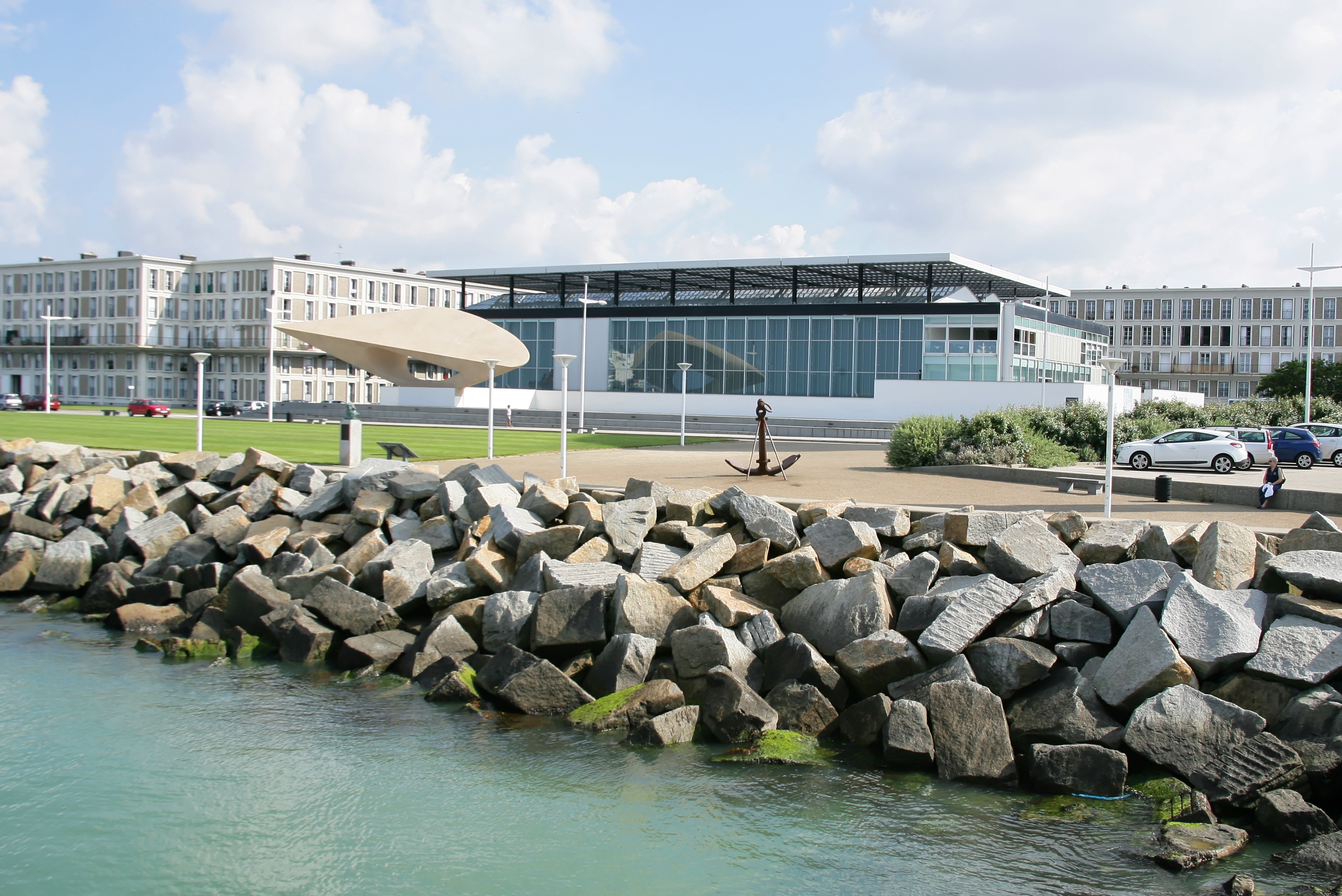 Le Musée André Malraux, un bâtiment emblématique de l'après-guerre